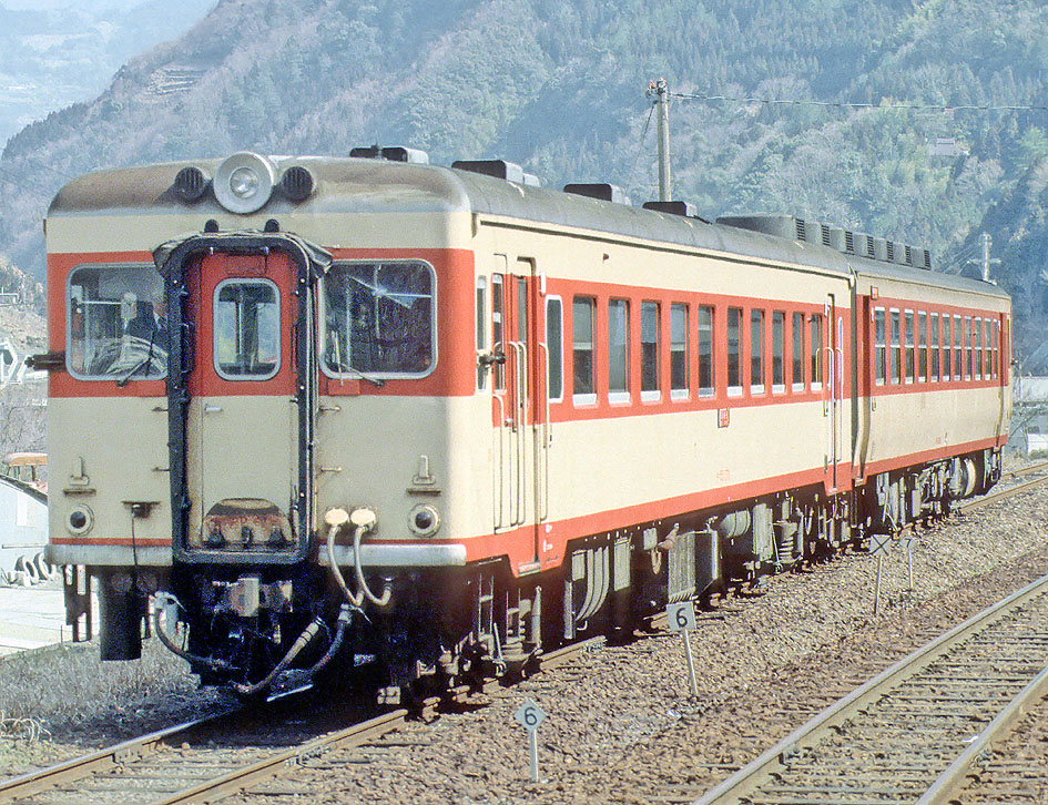 国鉄 キハ55 270+キハ65 68